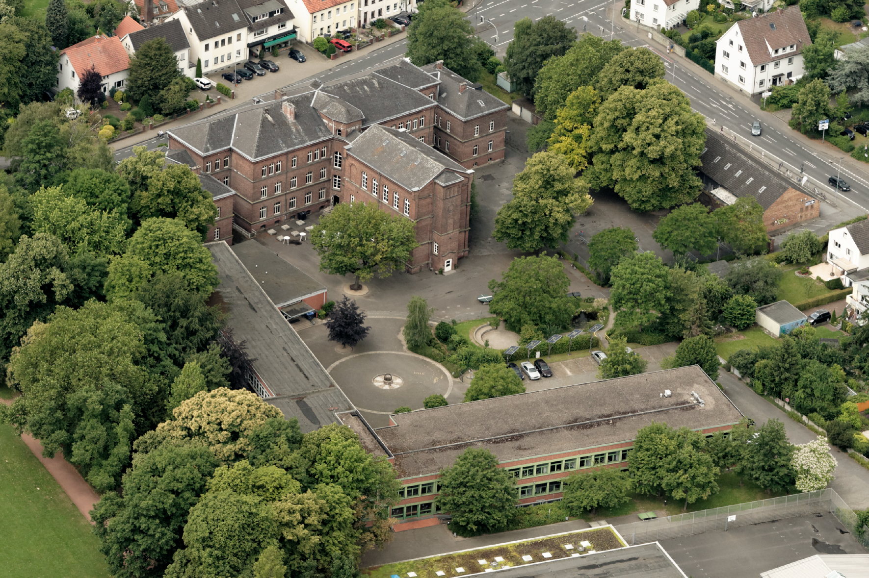 Fotoflug Sauerland Nord. Soest, Archigymnasium Soest The making of this document was supported by the Community-Budget of Wikimedia Germany.